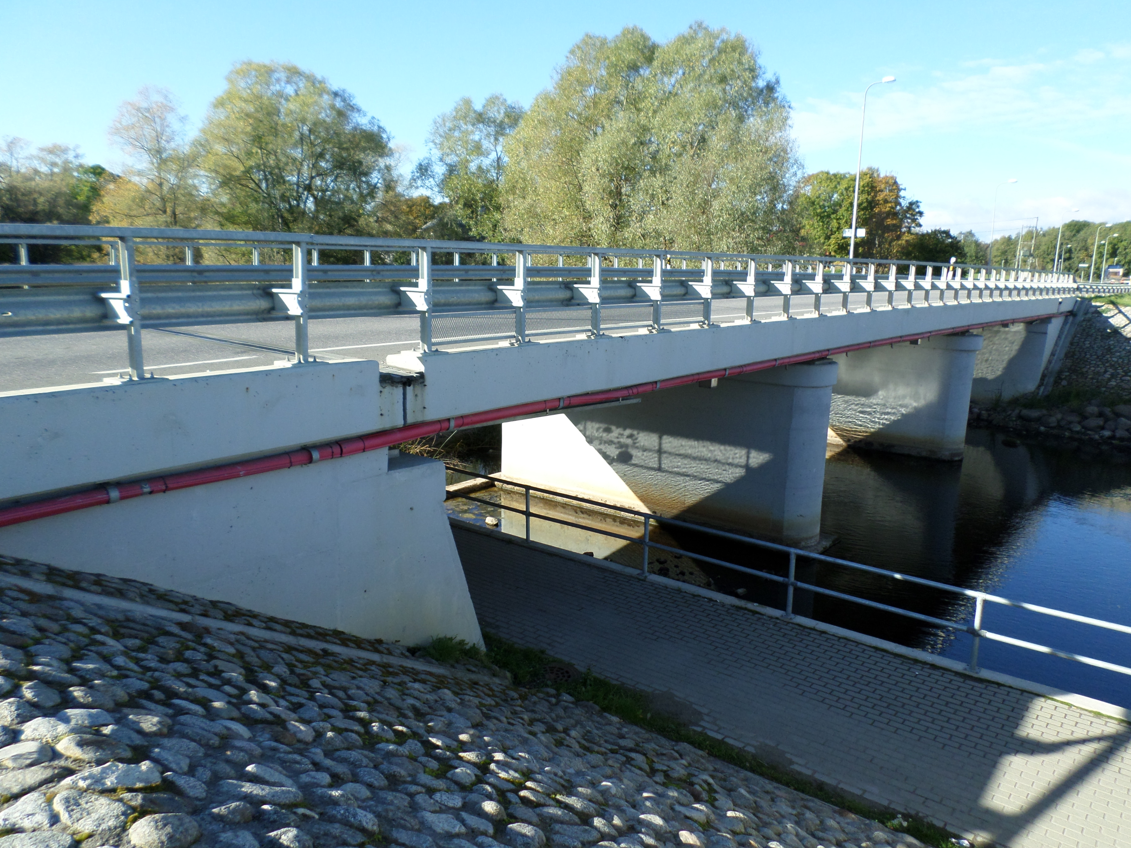 Vaskjala sild